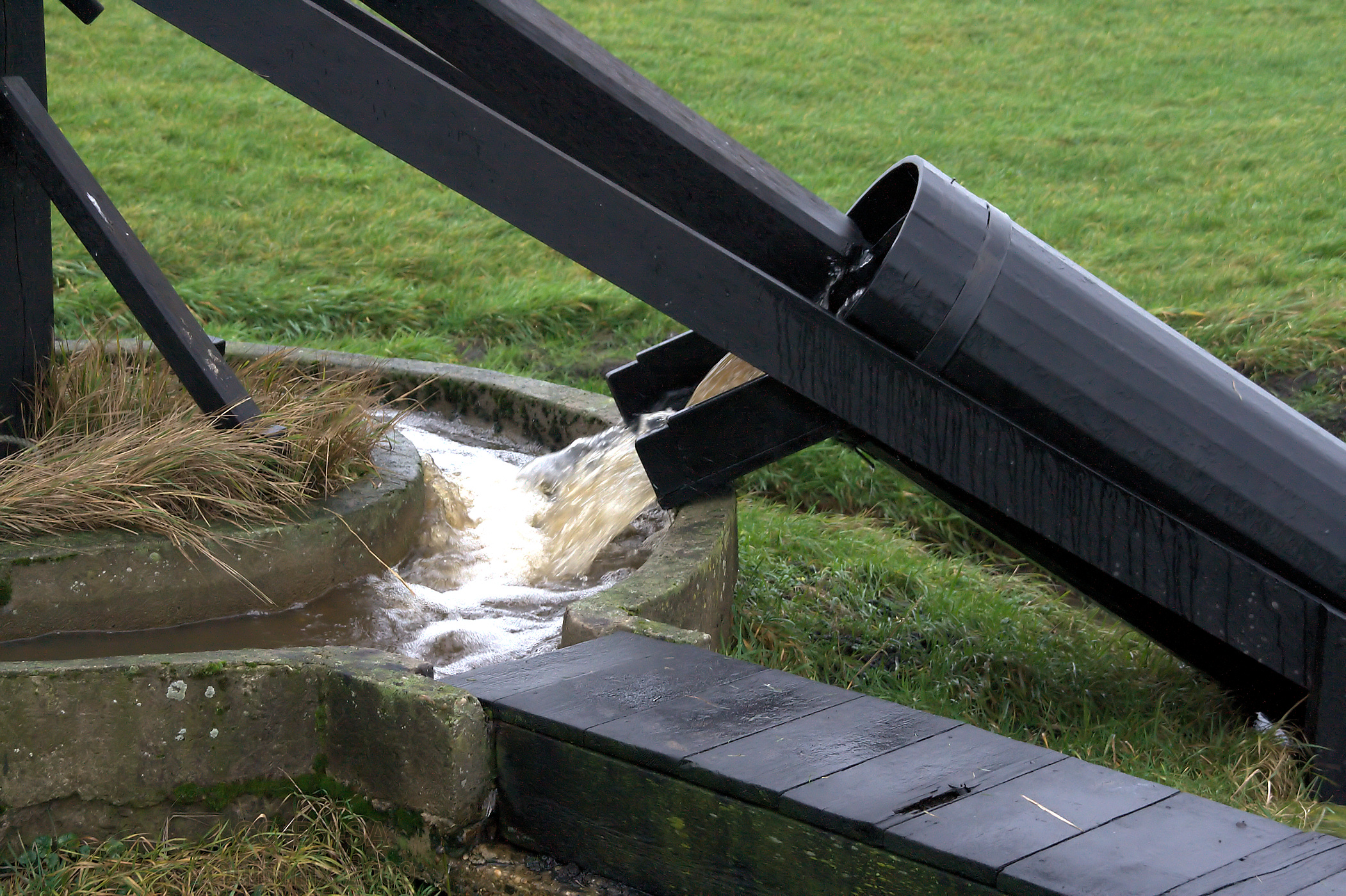 Tjasker bij It Heidenskip, malend - detail betonnen goot